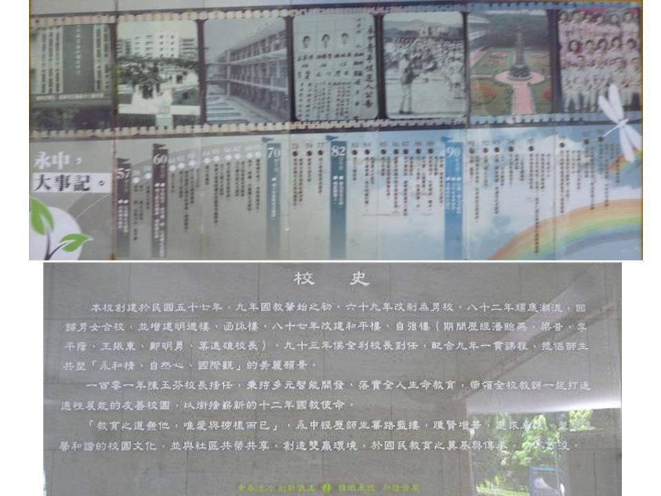 永和國中牆面校史圖表